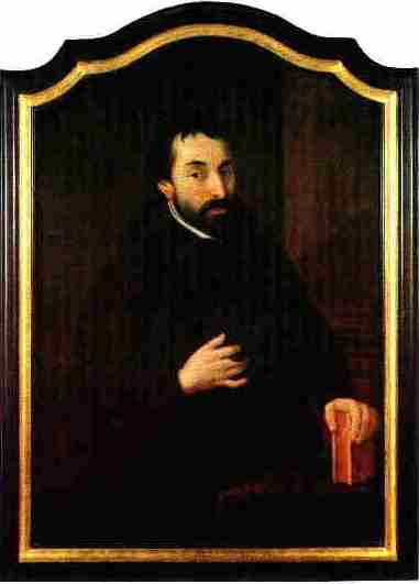 Zeitgenössisches Porträt Friedrich Spee (1591-1635), wahrscheinlich erst nach seinem Tod entstanden. Beschreibung im Katalog der Friedrich-Spee-Ausstellung Düsseldorf 1991: Ölbild 100 x 70 cm. Restauriert 1983 durch Bachem-Werkstatt Köln. Eigentum des Kölner Gymnasial- und Stiftungsfonds. Als Leihgabe im Friedrich-Spee-Kolleg Neuss. Provenienz: Dreikönigsgymnasium Köln, das frühere Tricoronatum der Jesuiten, an dem Spee 1631/32 Vorlesungen gehalten hat.